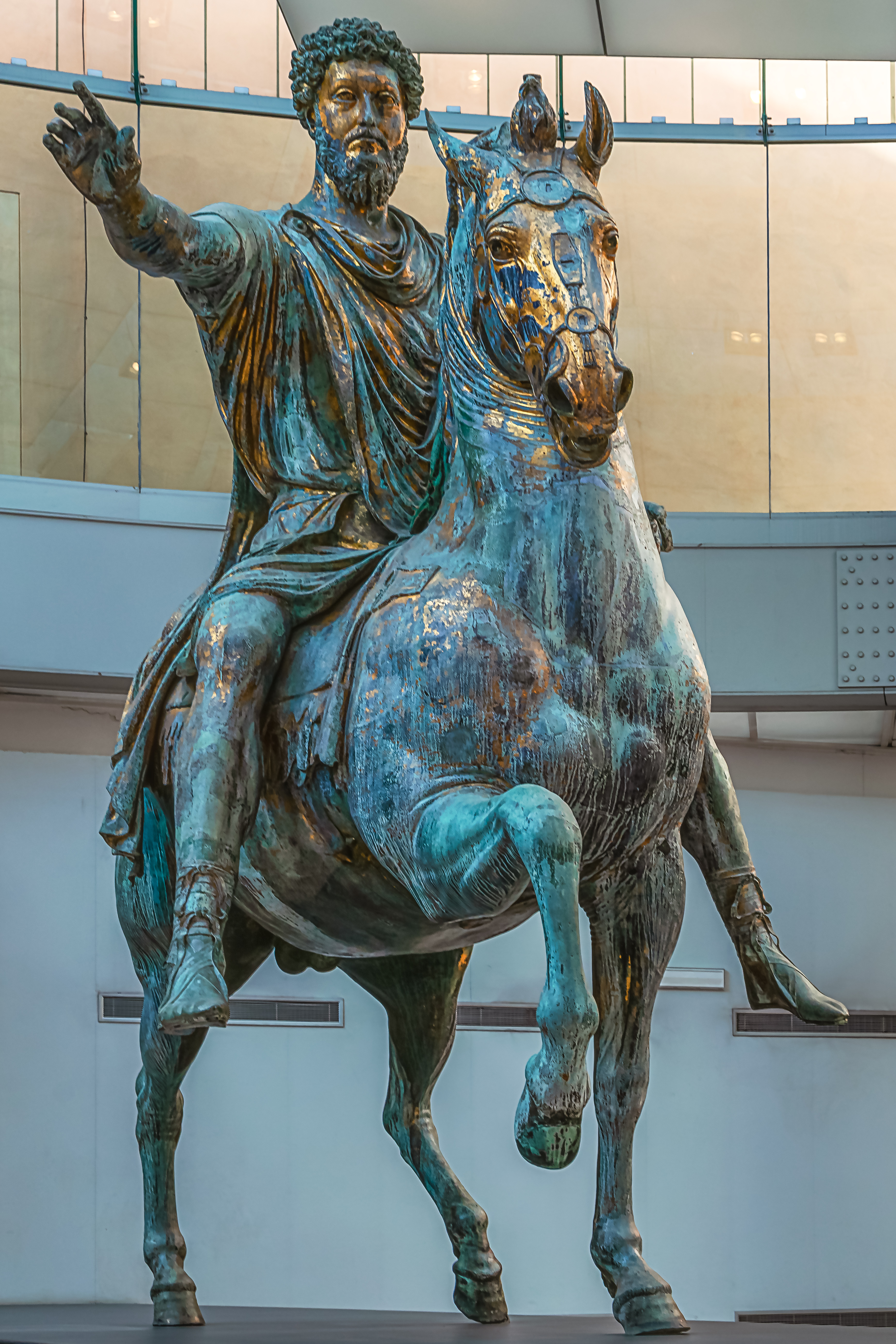 Das Reiterstandbild des Mark Aurel im Konservatorenpalast der Kapitolinischen Museen in Rom